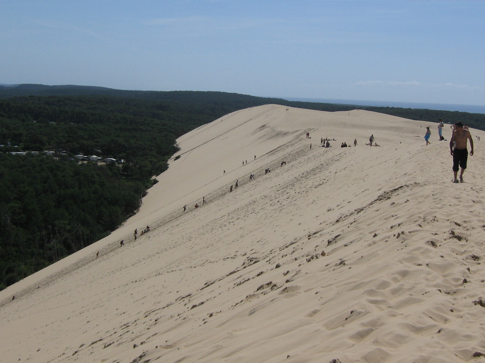 L'envers de la dune du Pyla (pente:45°)